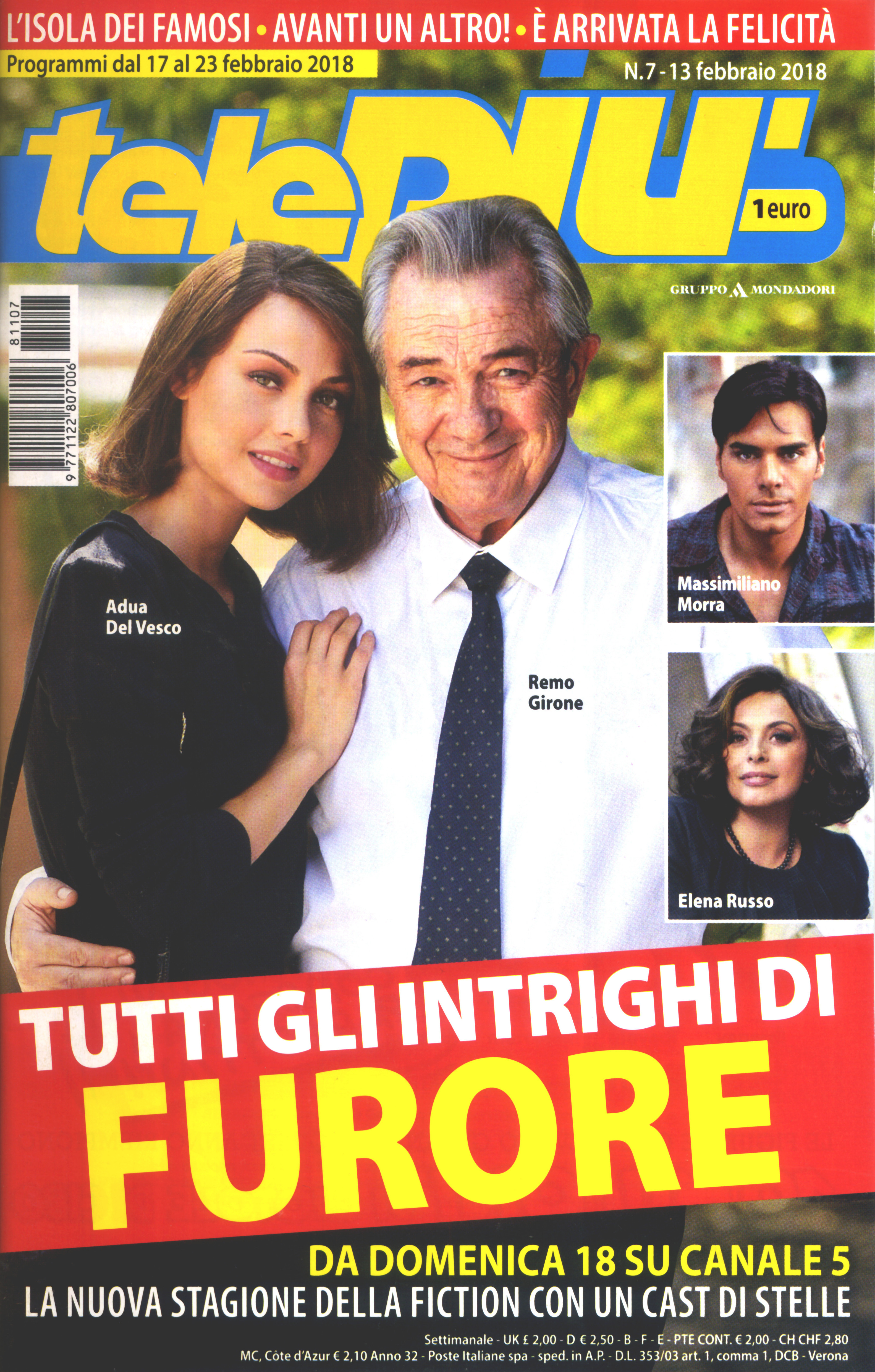 Copertina della rivista Telepiù del 13 febbraio 2018, Arnoldo Mondadori Editore.